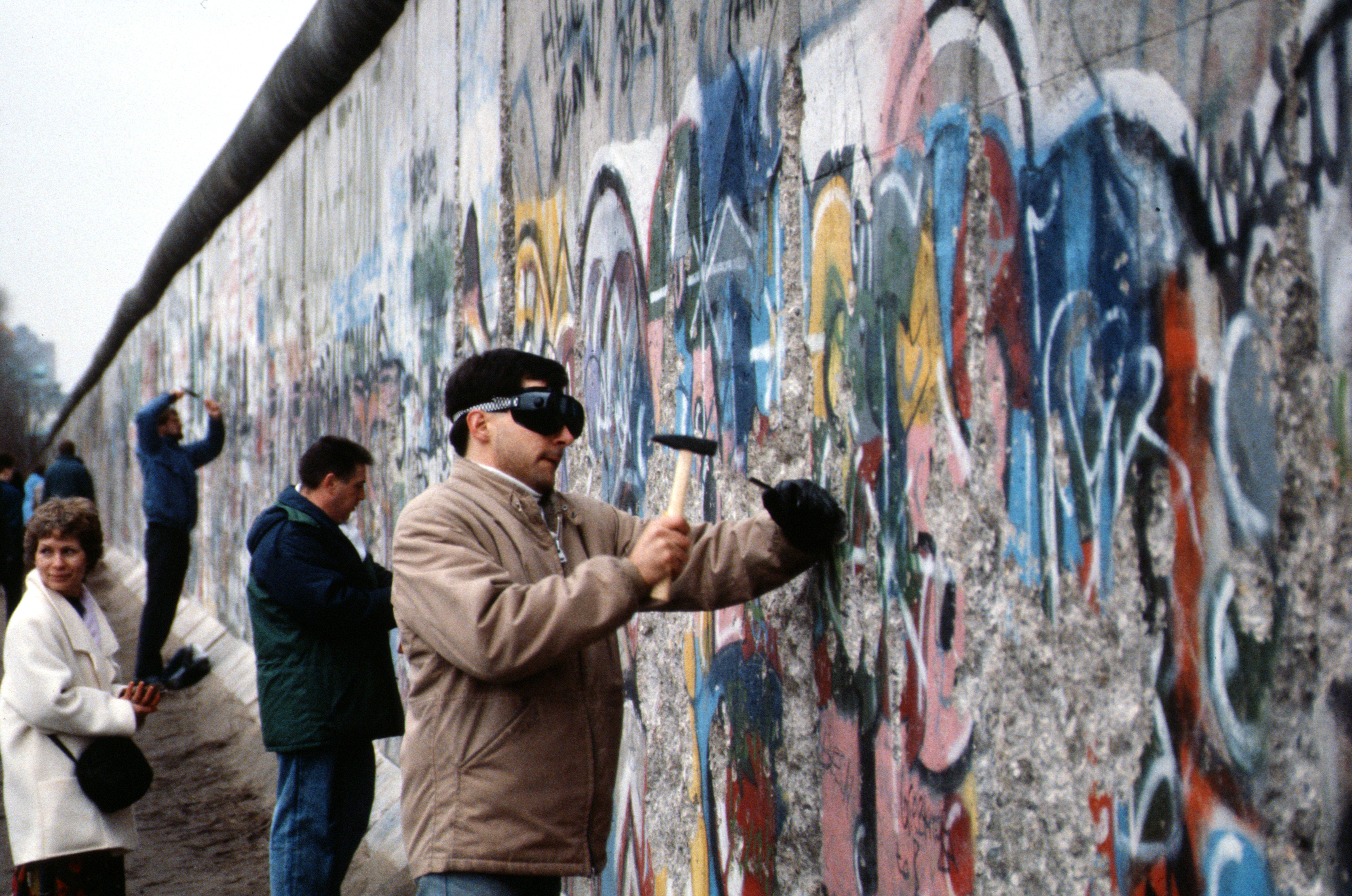 Berlin 1989, Fall der Mauer, Chute du mur